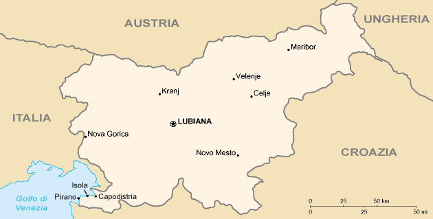 Slovenia map CIA fr traduite depuis CIA worldfactbook